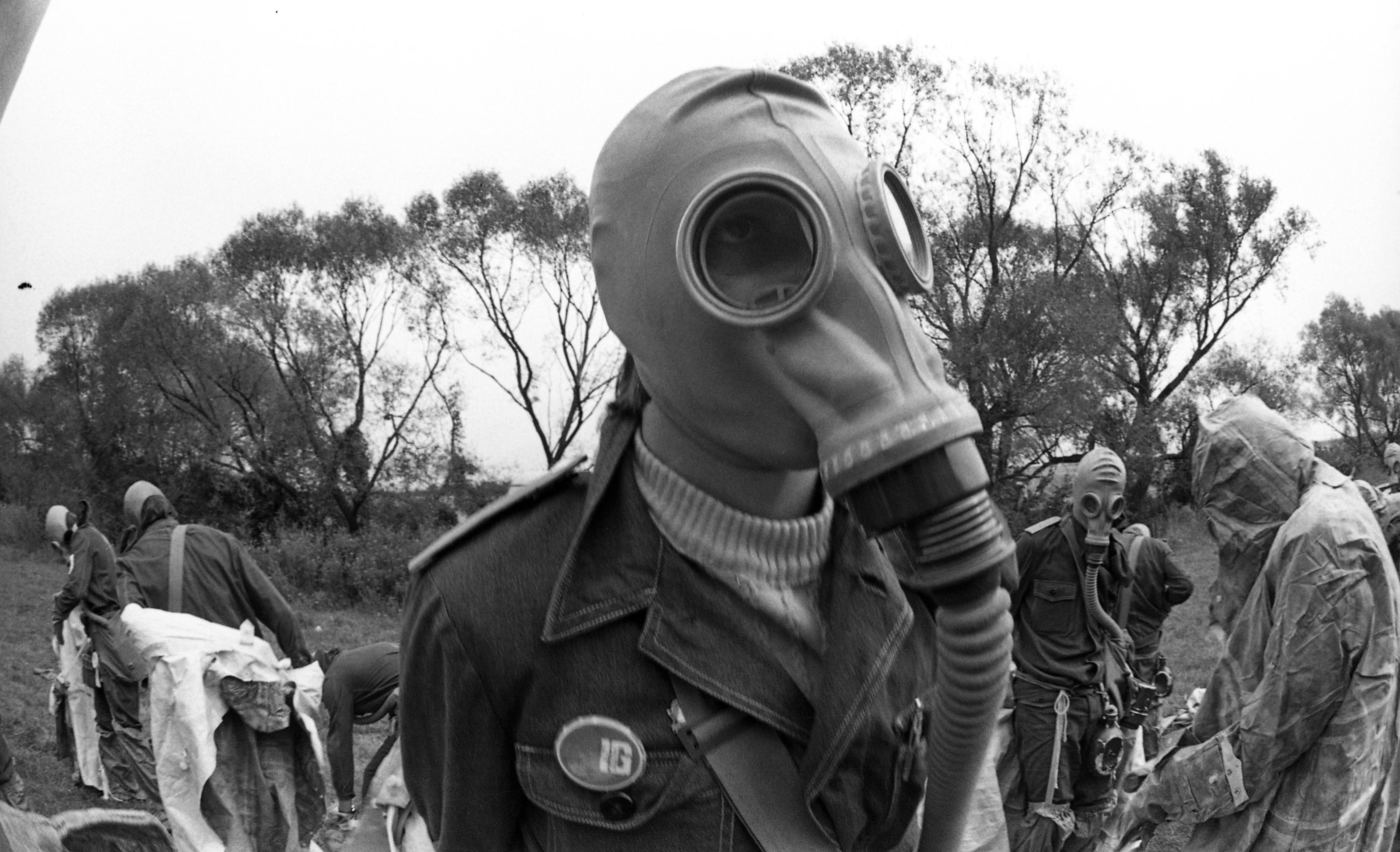 Ifjúgárdista gázálarcban az 1977-es VIII. Országos Ifjúgárda Szemlén Tags: Hungarian young guardist, in gas mask